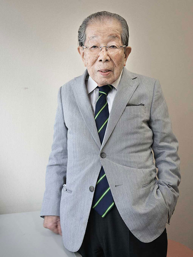 Dr. Shigeaki Hinohara